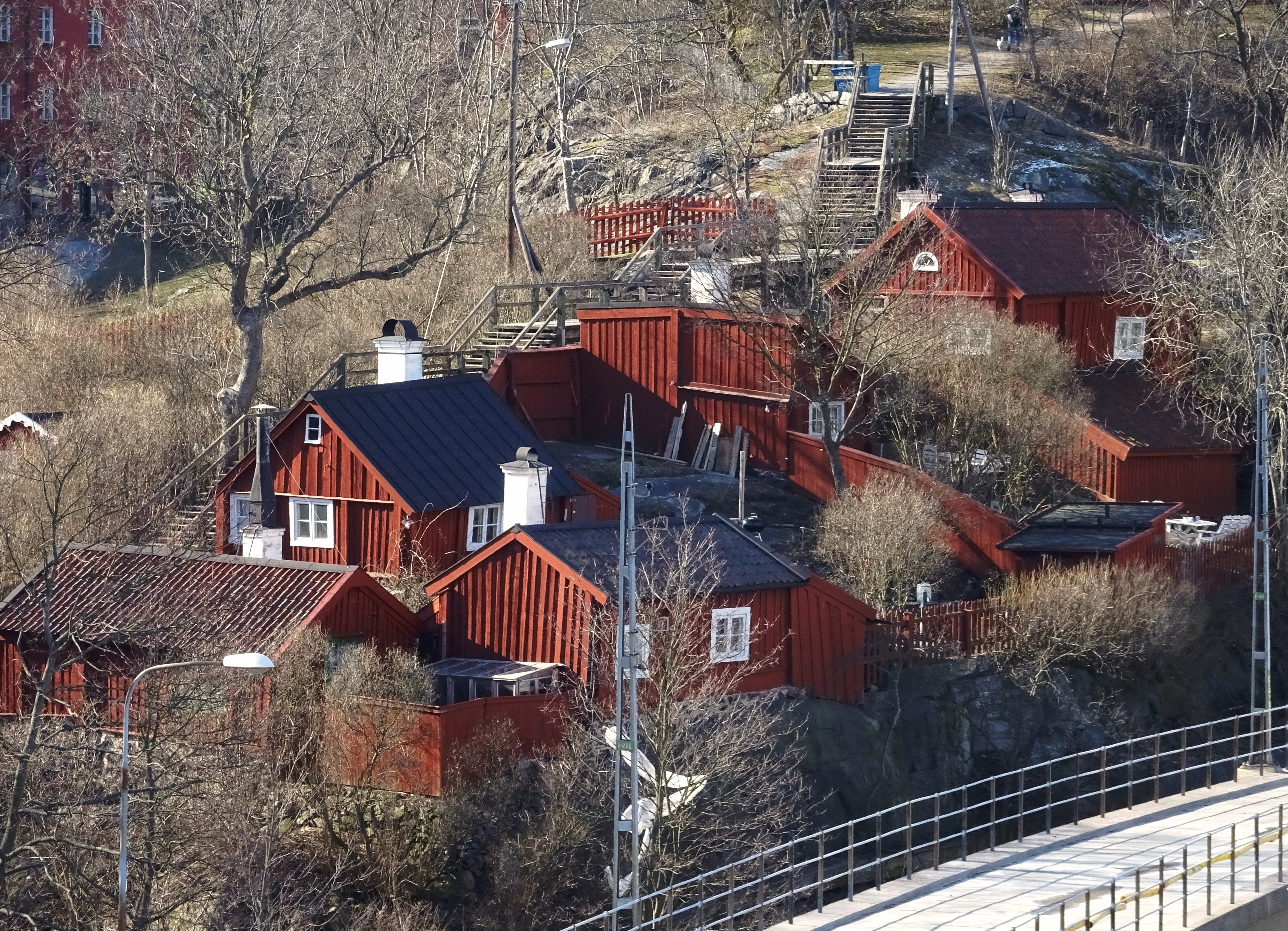 Kvastmakartrappan, fastigheten Tjärboden 1 sedd från Fåfängan